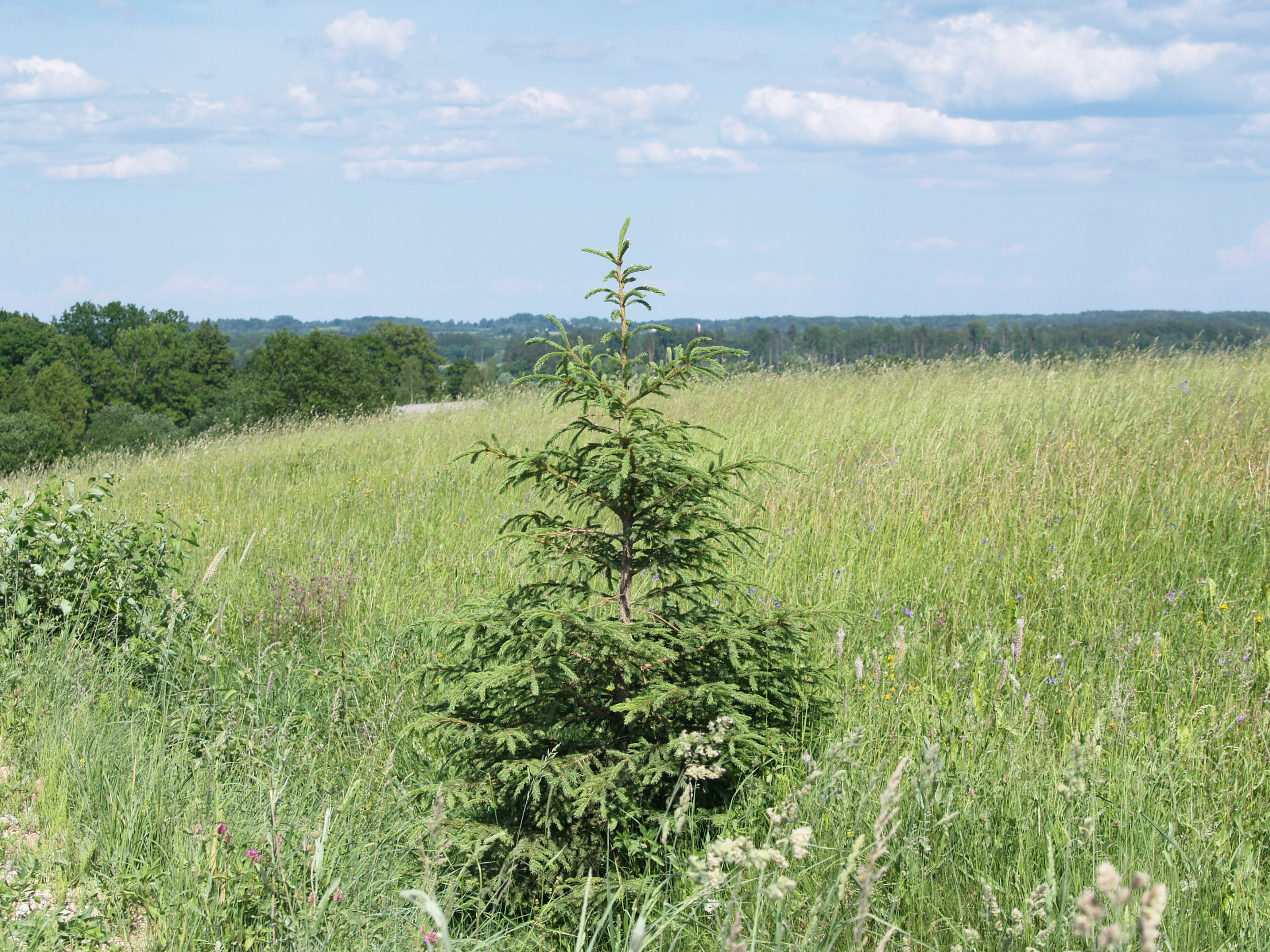 Kauļu apvidus (Kauli landscape)